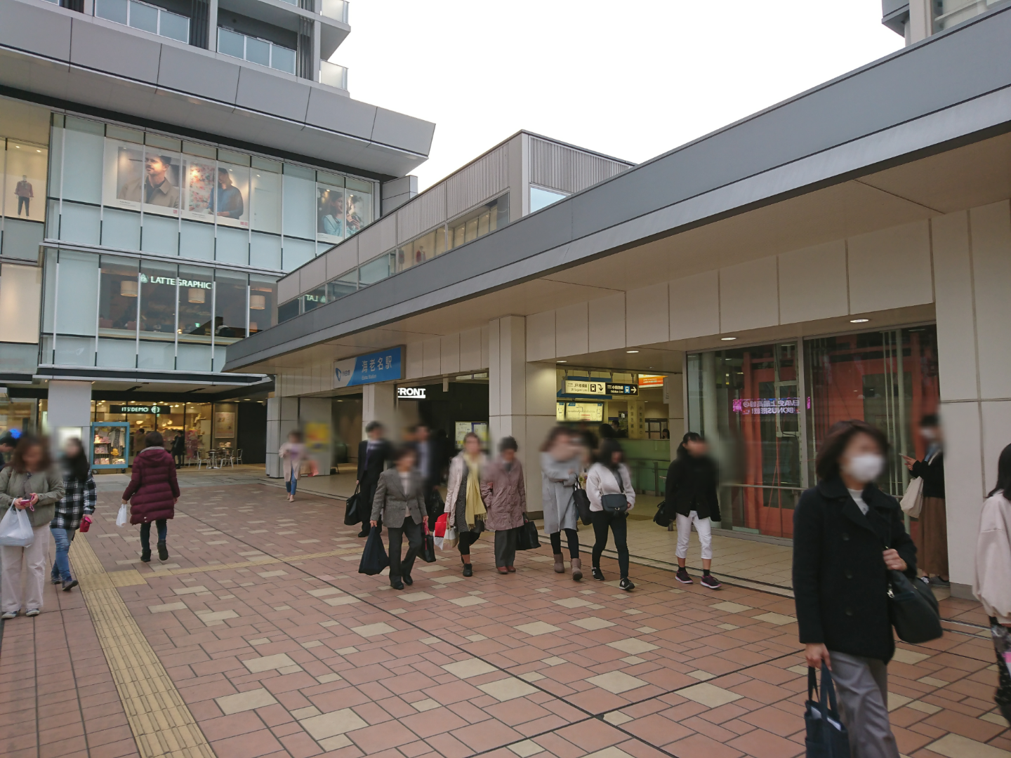 2019年2月20日撮影。